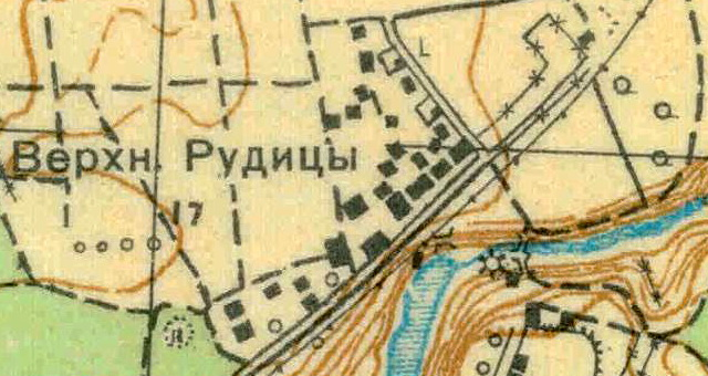 Топографическая карта Ленинградской области, квадрат О-35-11-Г-г (Муховицы), деревня Верхние Рудицы.